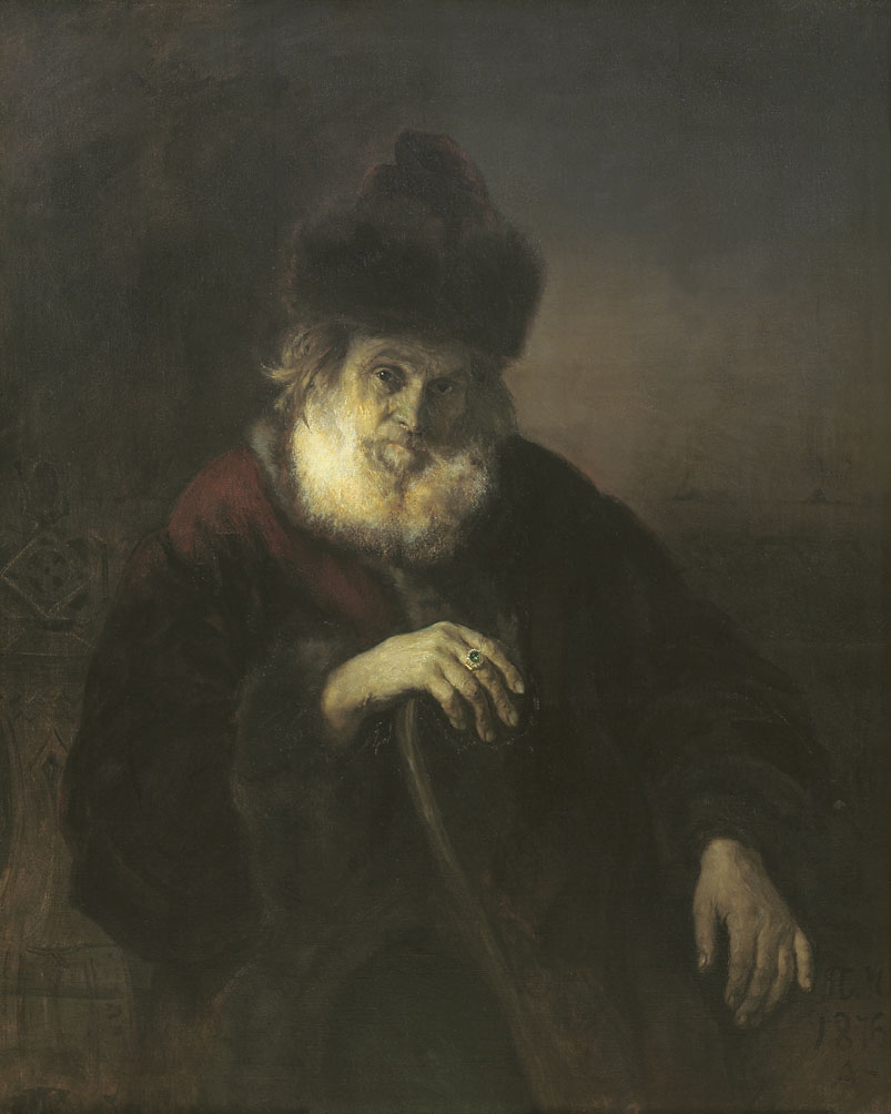 A Boyar